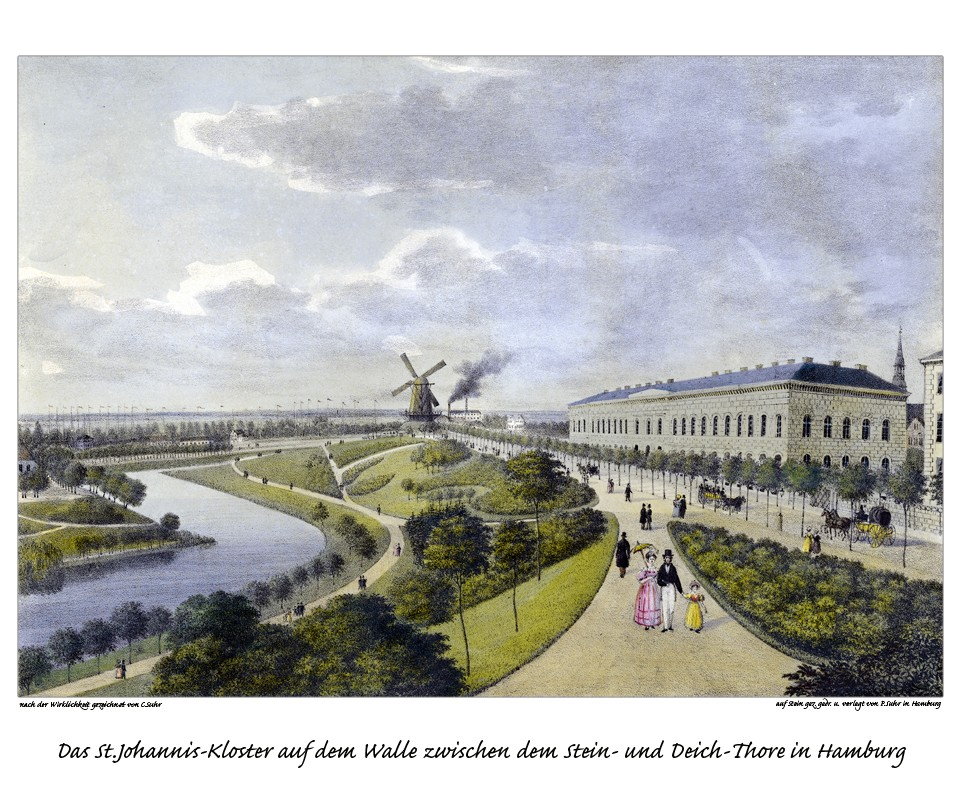 Das St. Johannis-Kloster auf dem Walle zwischen dem Stein- und dem Deich-Thore..., gezeichnet von Christoffer Suhr, Litho von Peter Suhr